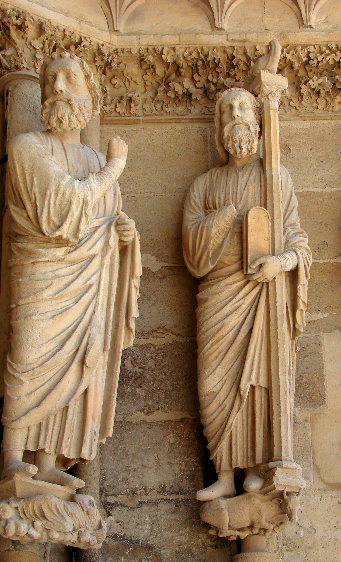 Cathédrale Notre-Dame de Reims, façade, portail de droite. A droite, Moïse portant les Tables de la Loi, le serpent d'airain à ses côtés; en figure de soutènement, le Veau d'Or (ou la vache rousse?; voir l'article "Houkat" sur Wikipédia).